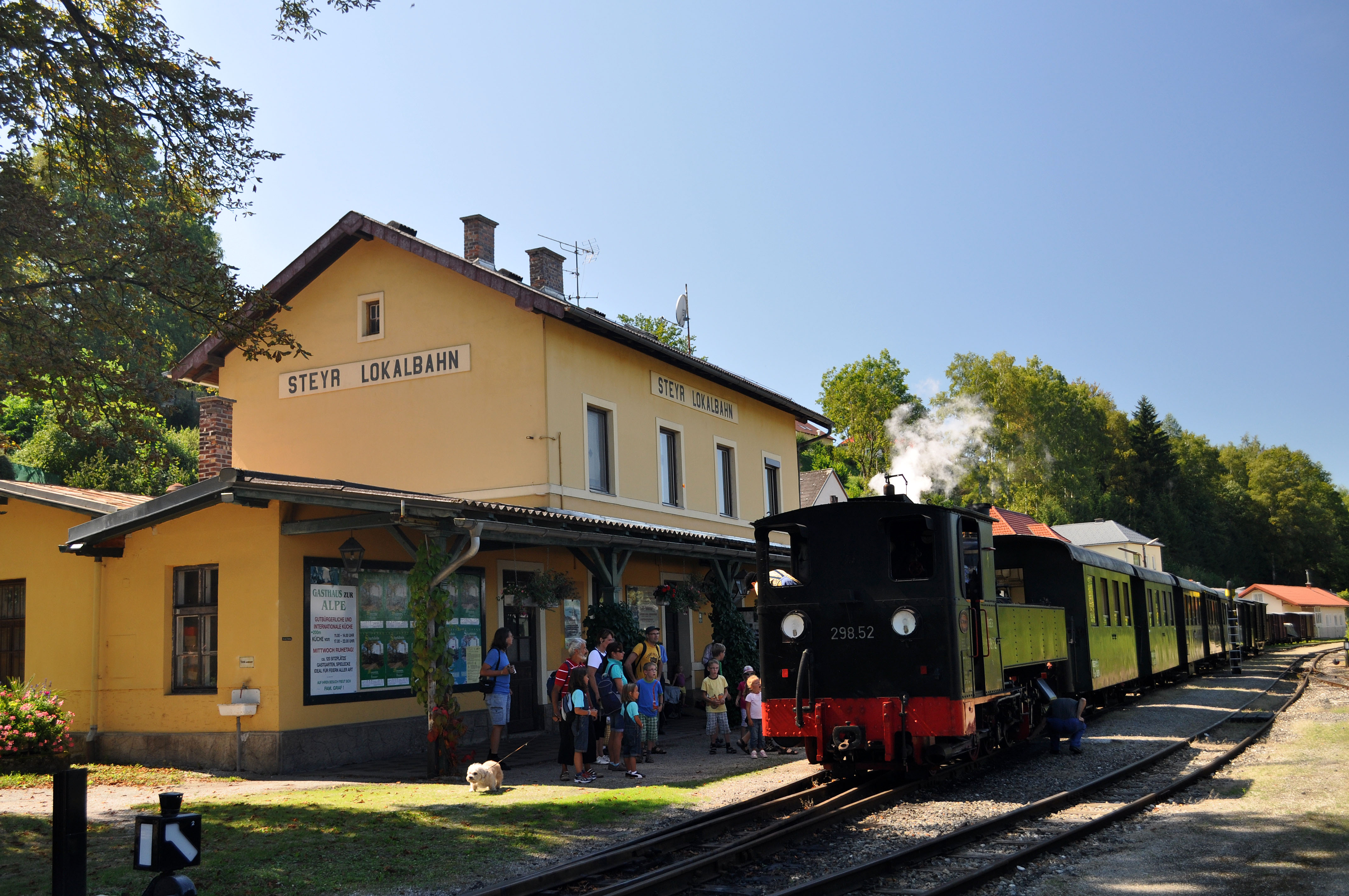 Areal des Bahnhofes Steyr-Lokalbahn und Streckenteil